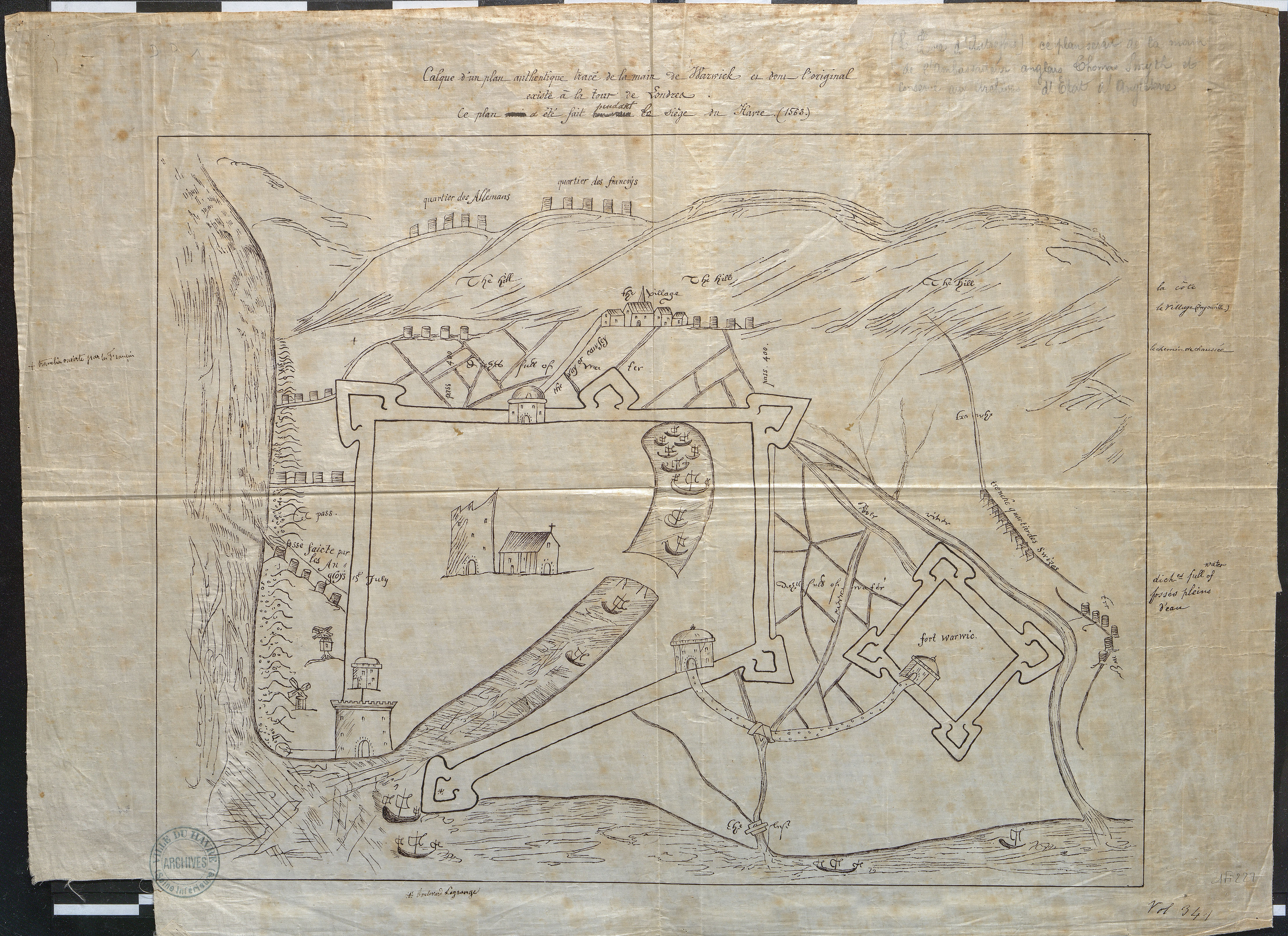 Plan du Havre représentant Le Havre, daté du 15 juillet 1563. Elle représente les fortifications de la ville avec ses portes et la Grosse Tour, et les fosses creusées par les anglais, ainsi que la citadelle baptisée "Fort Warwic". Les camps de l'armée du roi de France et de ses alliés est représenté sur la côté d'Ingouville ("the hill"). L'église Notre-Dame est représenté avec son tout-clocher qui est endommagé par les bombardements de l’artillerie française, alors que les anglais utilisaient la batterie qui était dans la tour.